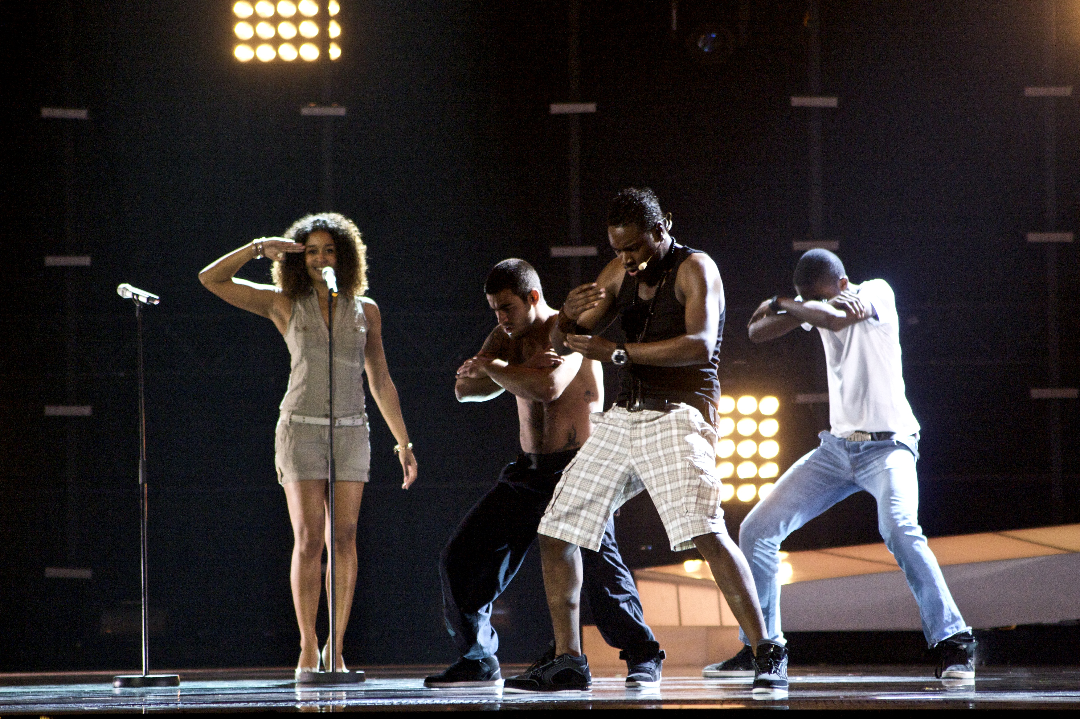 Foto: Vincent Hasselgård, Aktiv I Oslo.no Les artikkel på